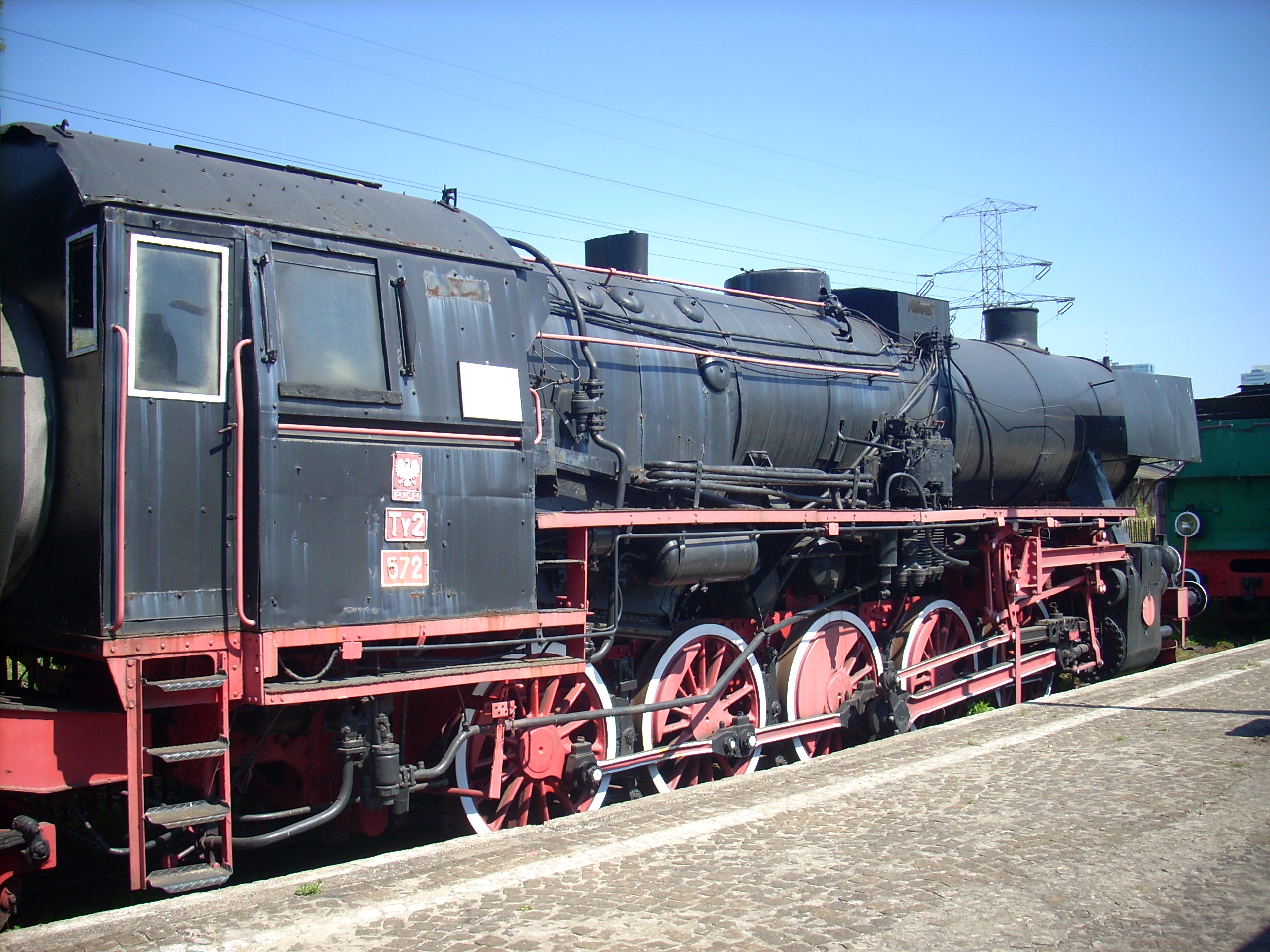 Lokomotywa parowa Ty2-572 w Muzeum Kolejnictwa w Warszawie